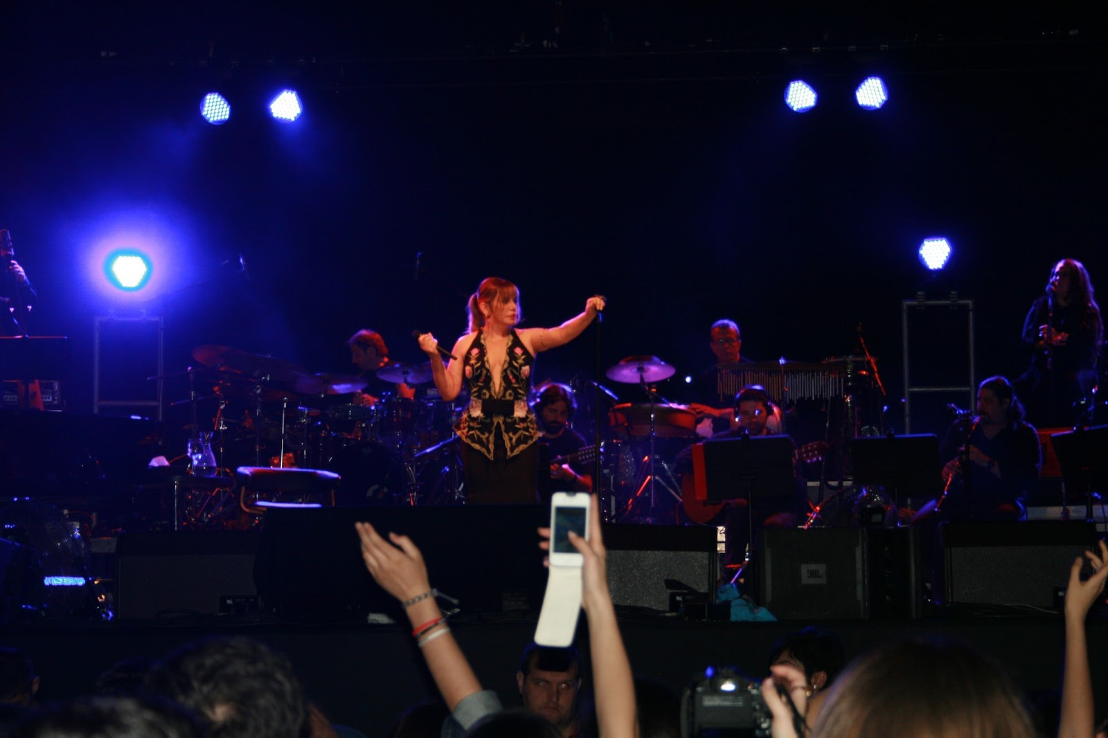 Sezen Aksu'nun İstanbul Teknik Üniversitesi'nde gerçekleşen konserinden sahne performansını sergilerken görünüm, 2013.